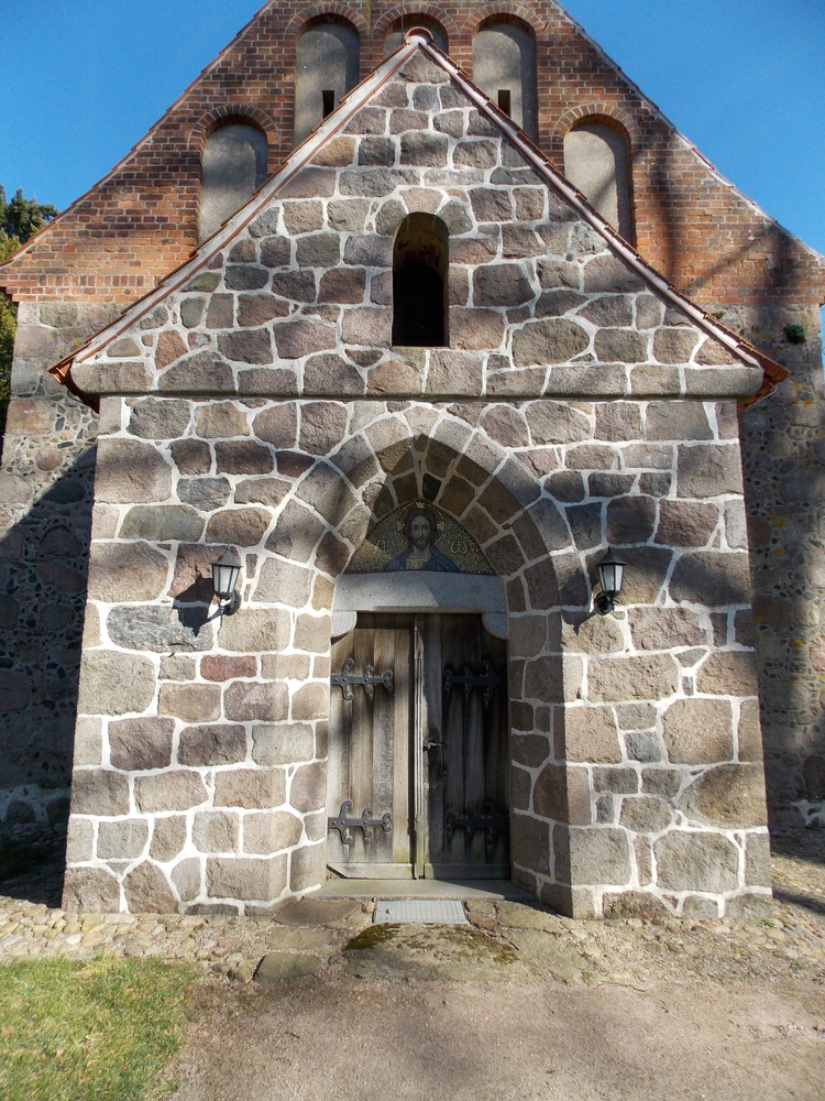 Eingangsvorbau Kirche Marsow